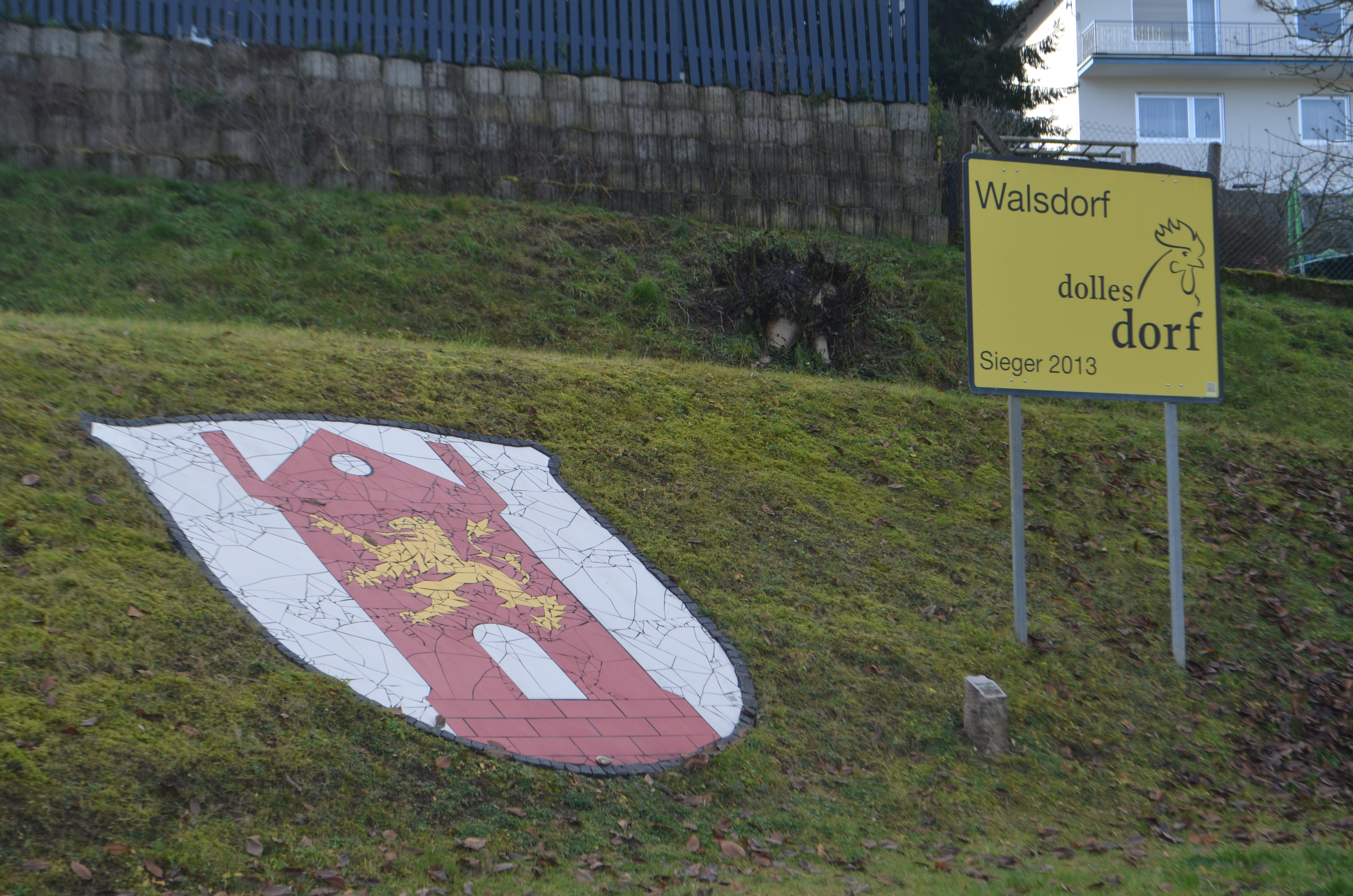 Walsdorf, Ortseingang, Wappen + Dolles Dorf